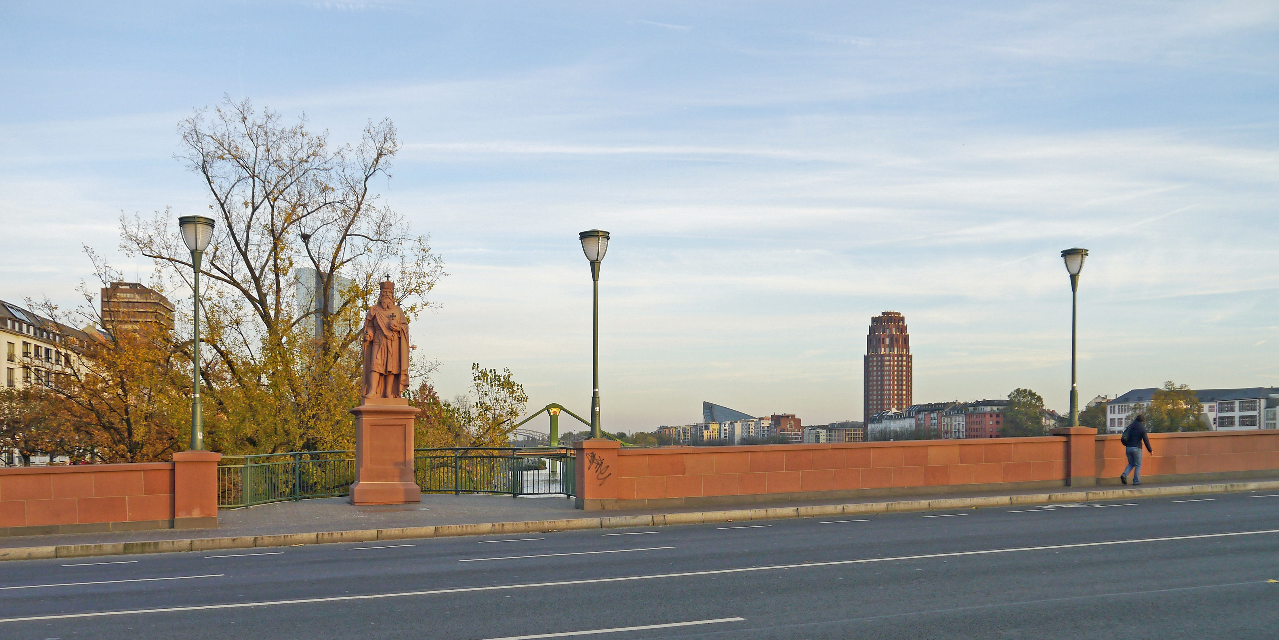 Kopie der Skulptur Karl der Große, 2016 auf der Alten Brücke in Frankfurt am Main (Original im Historischen Museum).